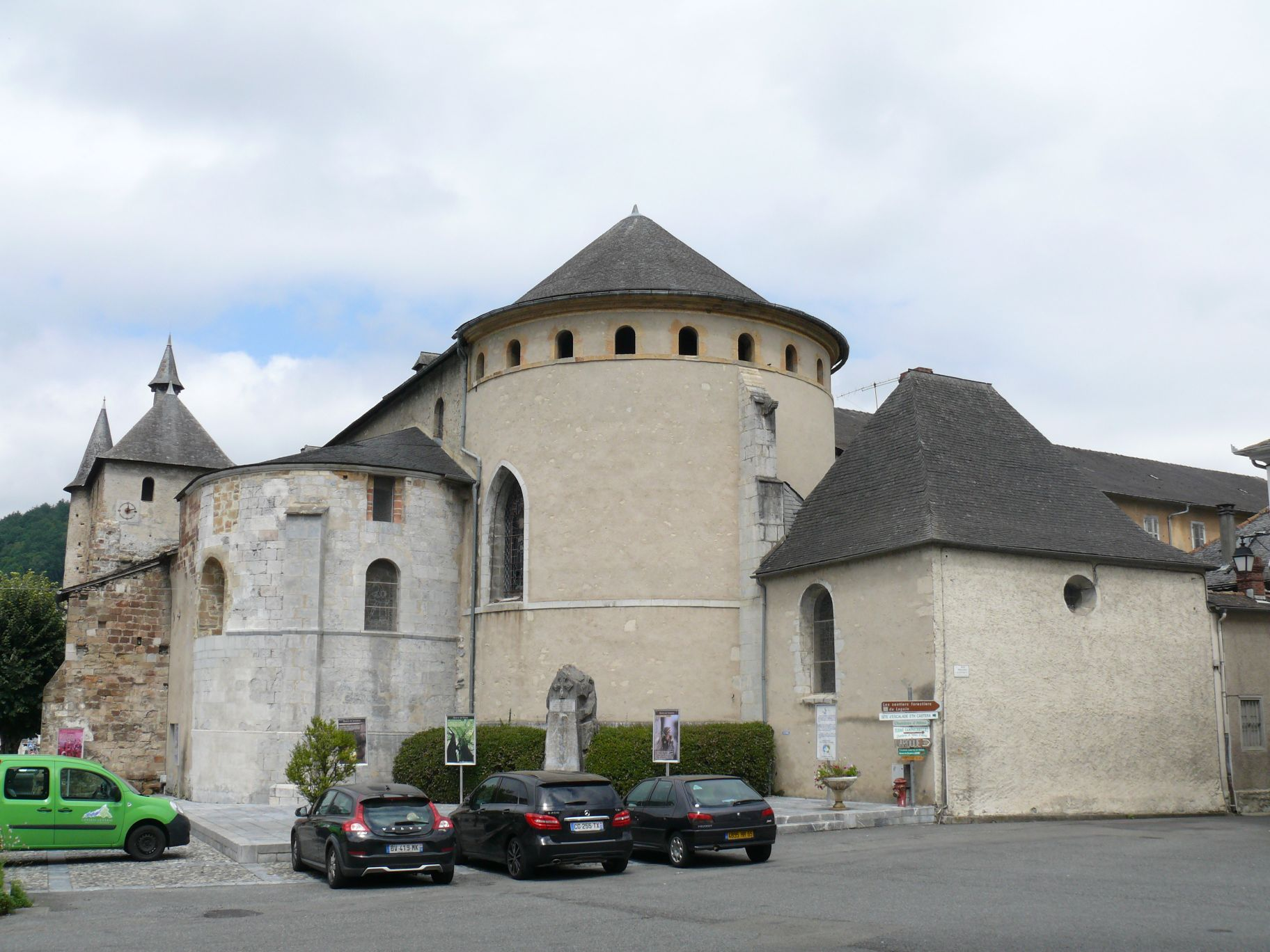 L'église Saint-Pierre de Saint-Pé-de-Bigorre (Hautes-Pyrénées, Midi-Pyrénées, France).